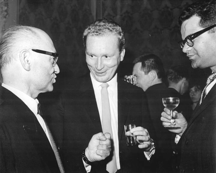 Karlsbad, Filmfestival, Brousil, Beyer, Wolf Zentralbild-Hochneder 6.7.1964 14. Internationales Filmfestival in Karlovy Vary-Zu einem großen Empfang hatte die Festspielleitung am Eröffnungstage des Internationalen Filmfestivals alle Teilnehmer an den Festspielen am Abend des 4.7.1964, geladen. Es gab die ersten Gespräche der Ausländer mit ihren tschechoslowakischen Gastgebern. Hier unterhalten sich der Präsident der Jury A.M. Brousil, Regisseur Frank Beyer und Regiesseur Konrad Wolf (beide DDR) -v.l.n.r. Abgebildete Personen: Beyer, Frank: Regisseur, DDR (PND 119217899) Brousil, Antonin M. Prof.: Rektor der Akademie der musischen Künste, CSSR Wolf, Konrad: Filmregisseur, Zentralkomitee (ZK) der SED, Präsident der Akademie der Künste, Bruder von Markus Wolf, DDR